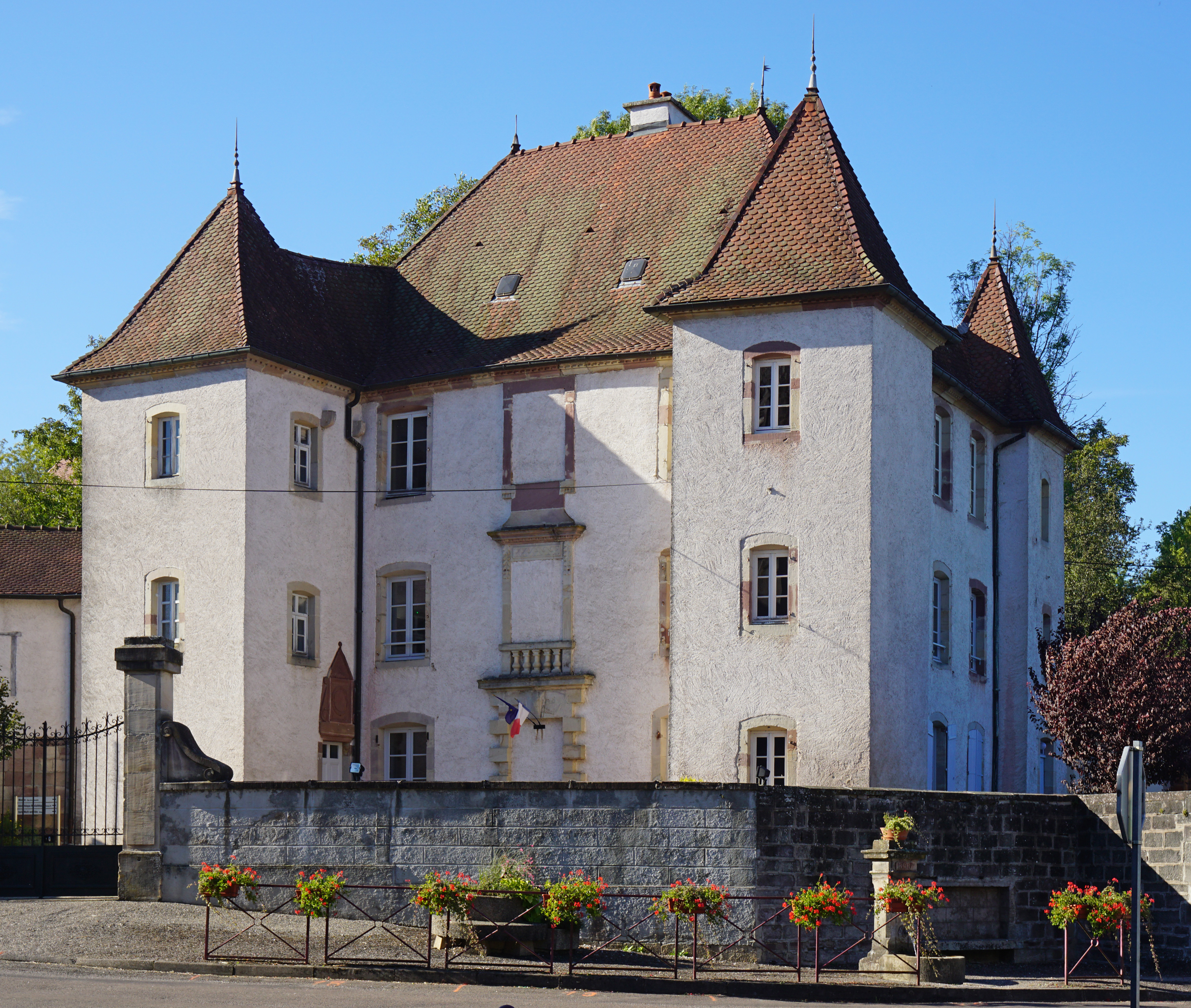 Le château de Quers qui abrite la mairie, la bibliothèque-médiathèque et la salle polyvalente.